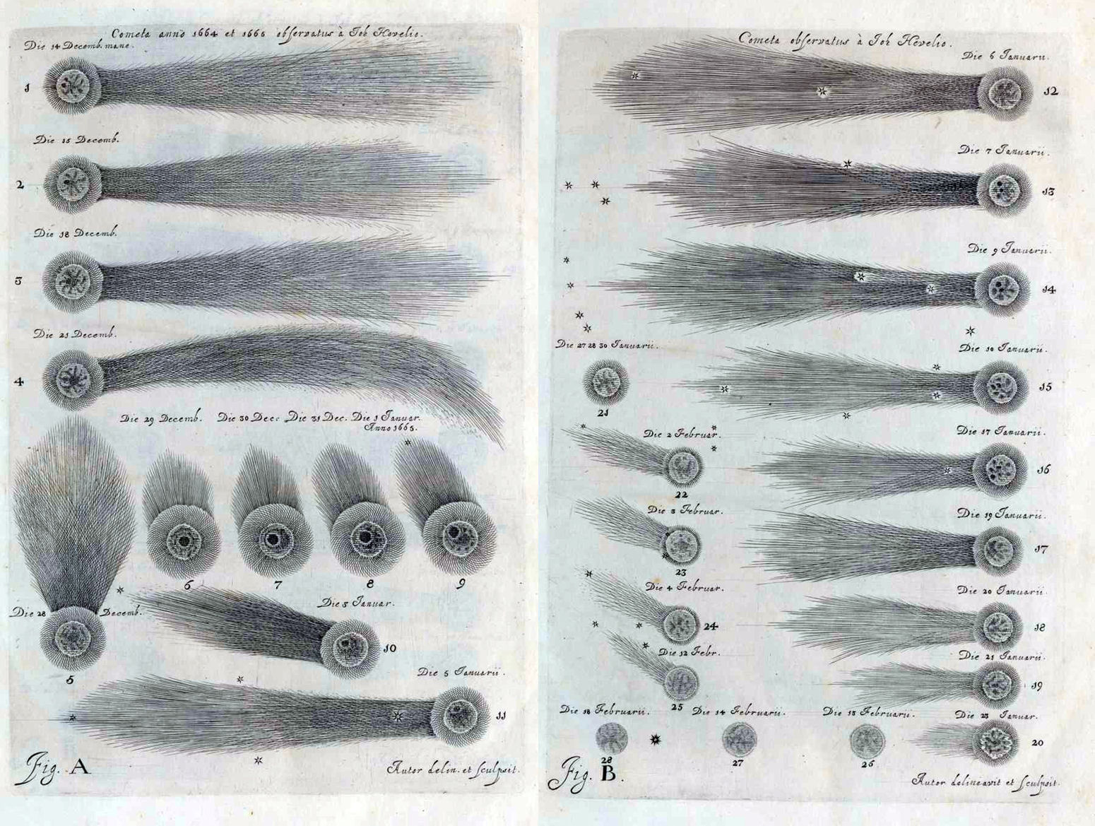 Tavole A e B dell'opera Prodromus cometicus di Johannes Hevelius